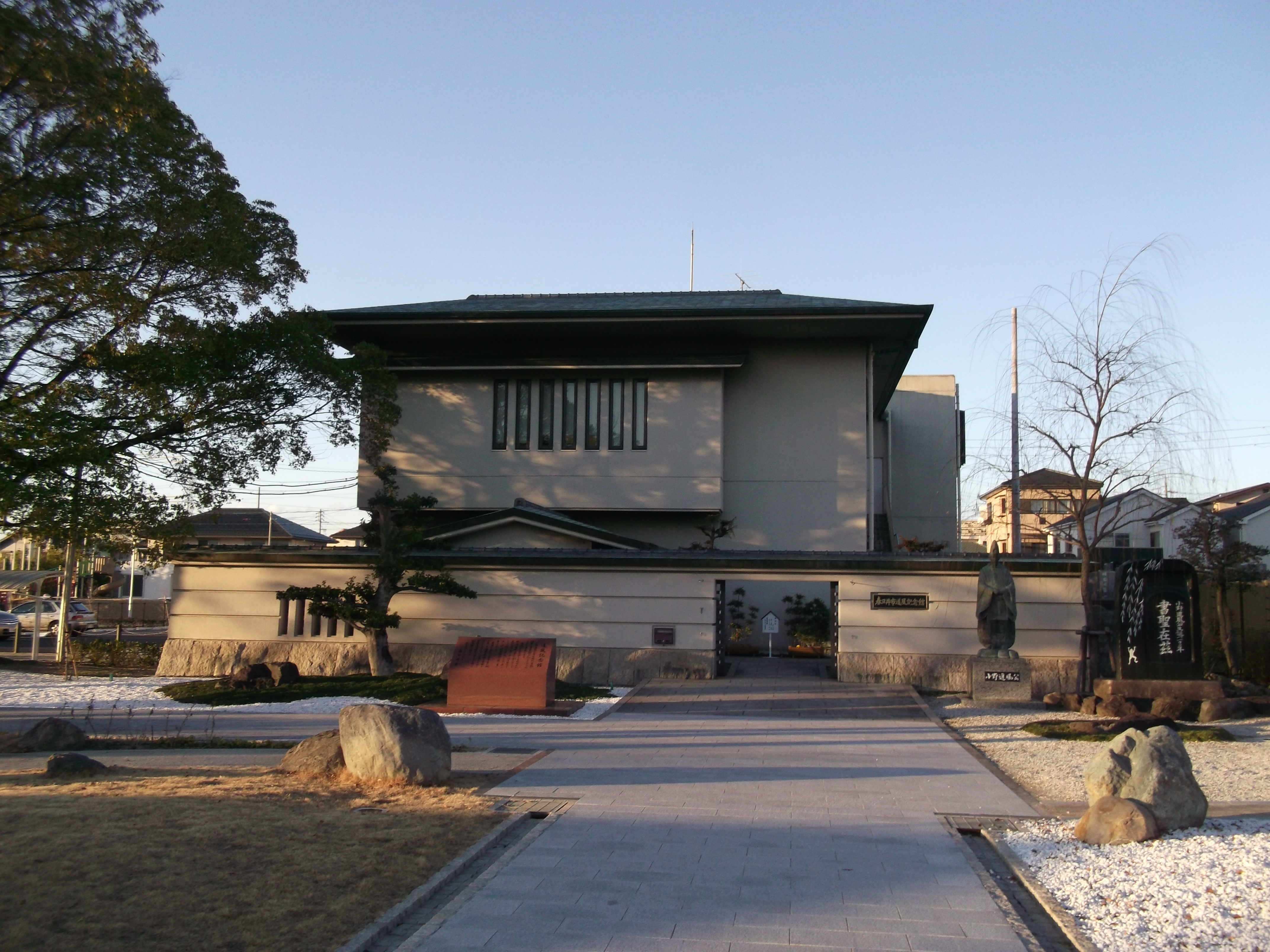 愛知県春日井市松河戸町の道風記念館を南側より撮影